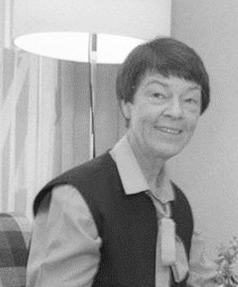 Title: Bundeswehrkrankenhaus Koblenz, Schmidt mit Gattin Extra information: Helmut Schmidt im Bundeswehrzentralkrankenhaus Koblenz, Ehefrau Hannelore "Loki" Schmidt zu Besuch People in the image: Schmidt, Helmut: Bundeskanzler, Verteidigungsminister, SPD, Bundesrepublik Deutschland Factual corrections and alternative descriptions are encouraged separately from the original description. Additionally errors can be reported at this page to inform the Bundesarchiv. Original historic description: Bundeskanzler Schmidt im [Zentralbunker] der Bundeswehr in Koblenz